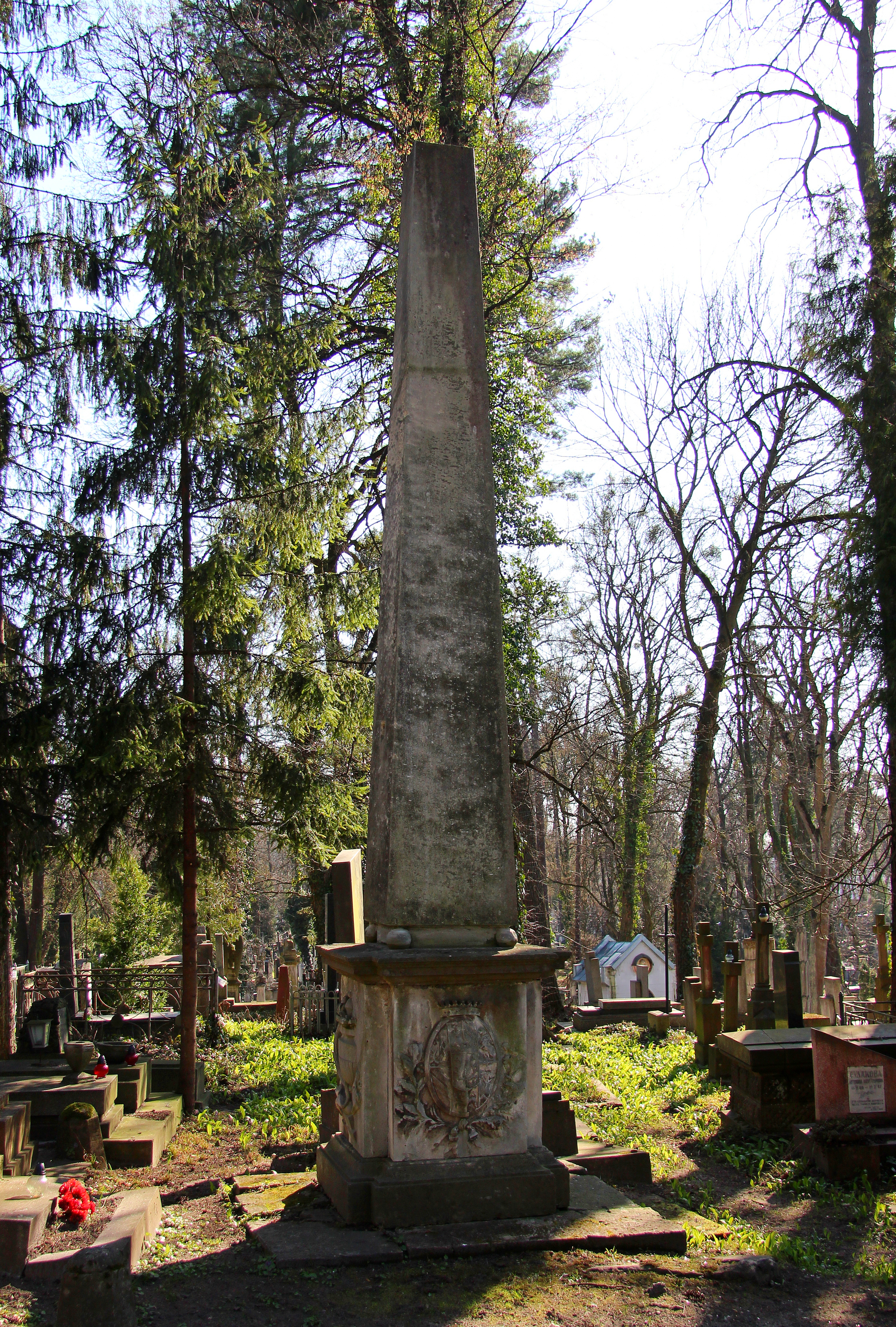 Пам'ятник на могилі губернатора Йоганна Гайсрука.Личаківський цвинтар , поле № 10.